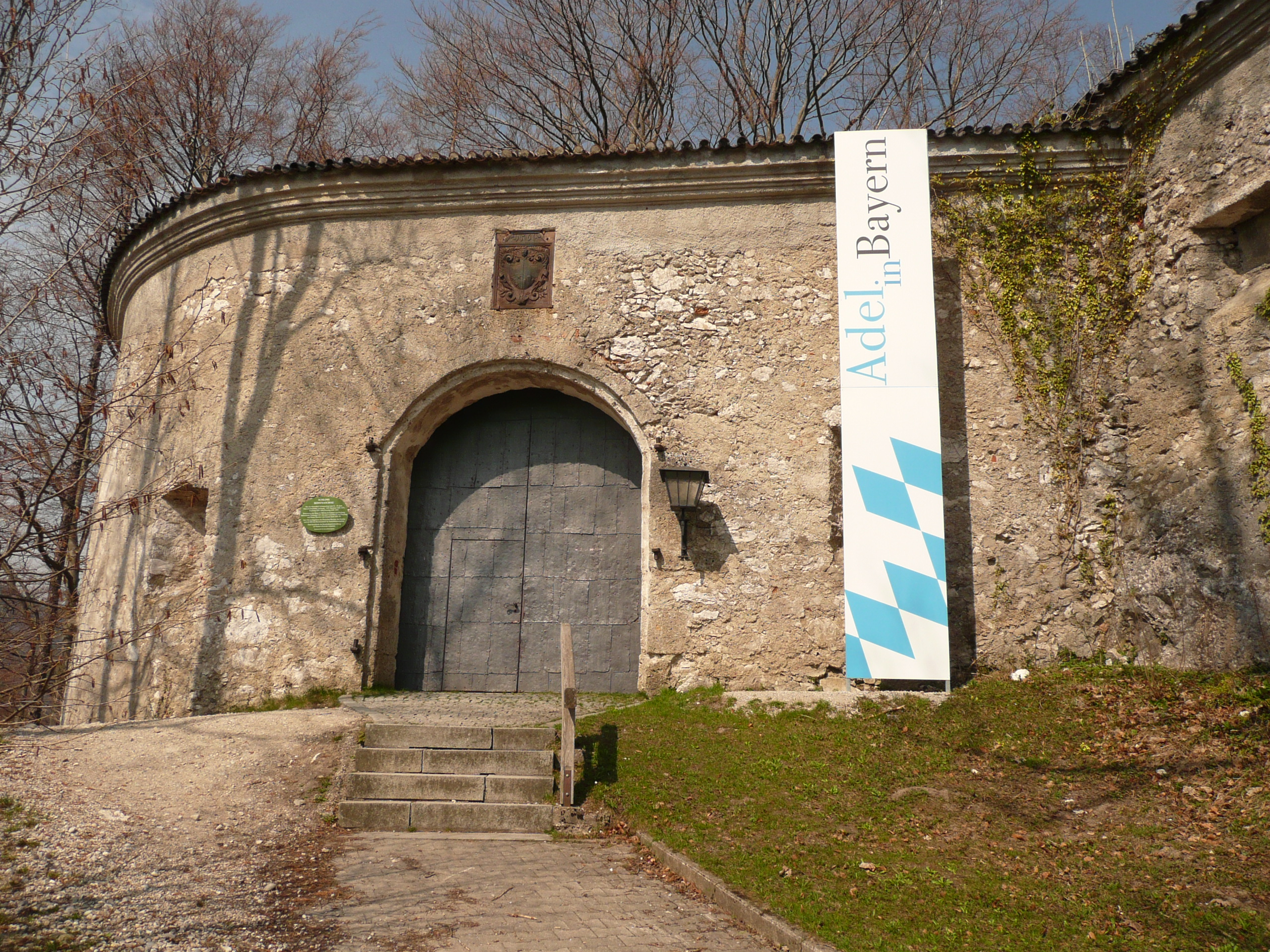 Tor zur Vorburg mit Eisenbeschlagenem Tor. Darüber eingelassenes Wappen der Freyberger, daneben Werbebanner der Ausstellung im Prientalmuseum.